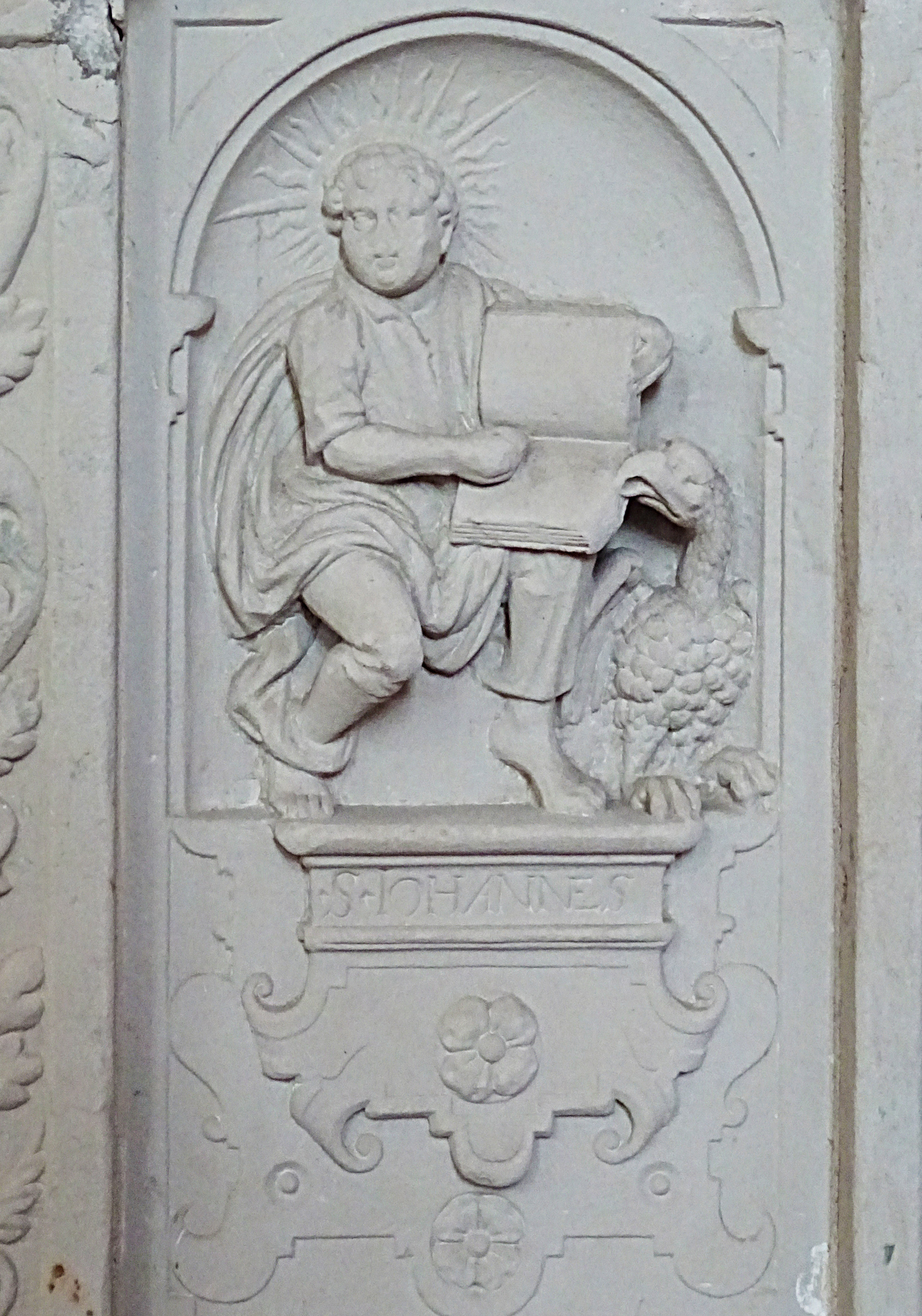 Steinbilderbibel in der St. Annenkirche (Eisleben), 29/29, Evangelist Johannes